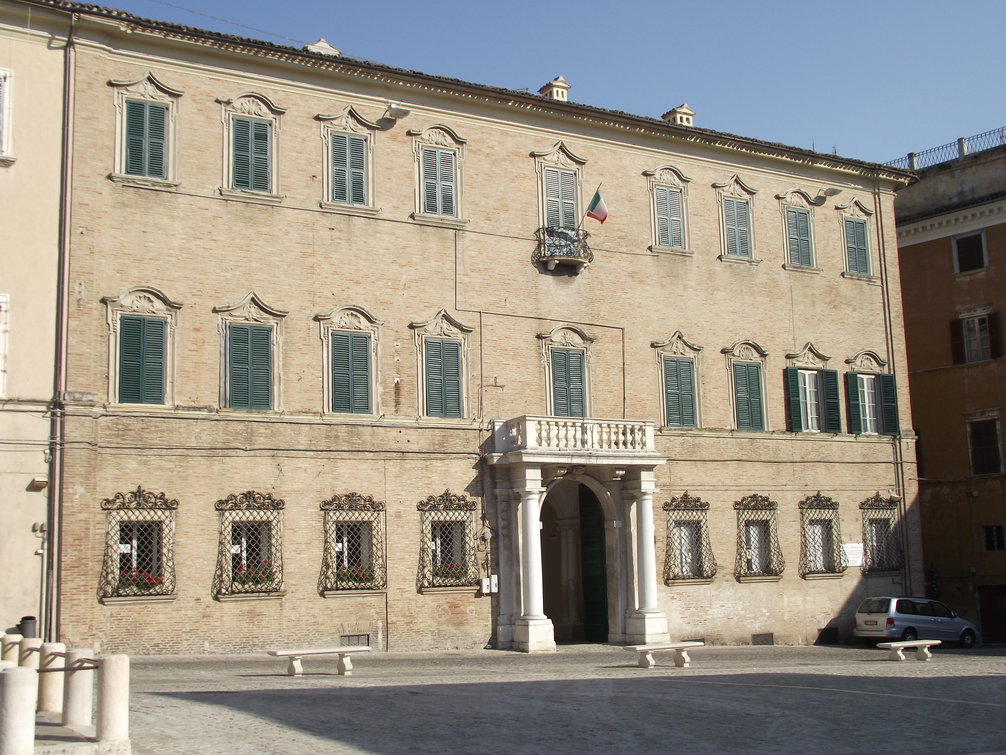 XVIII secolo